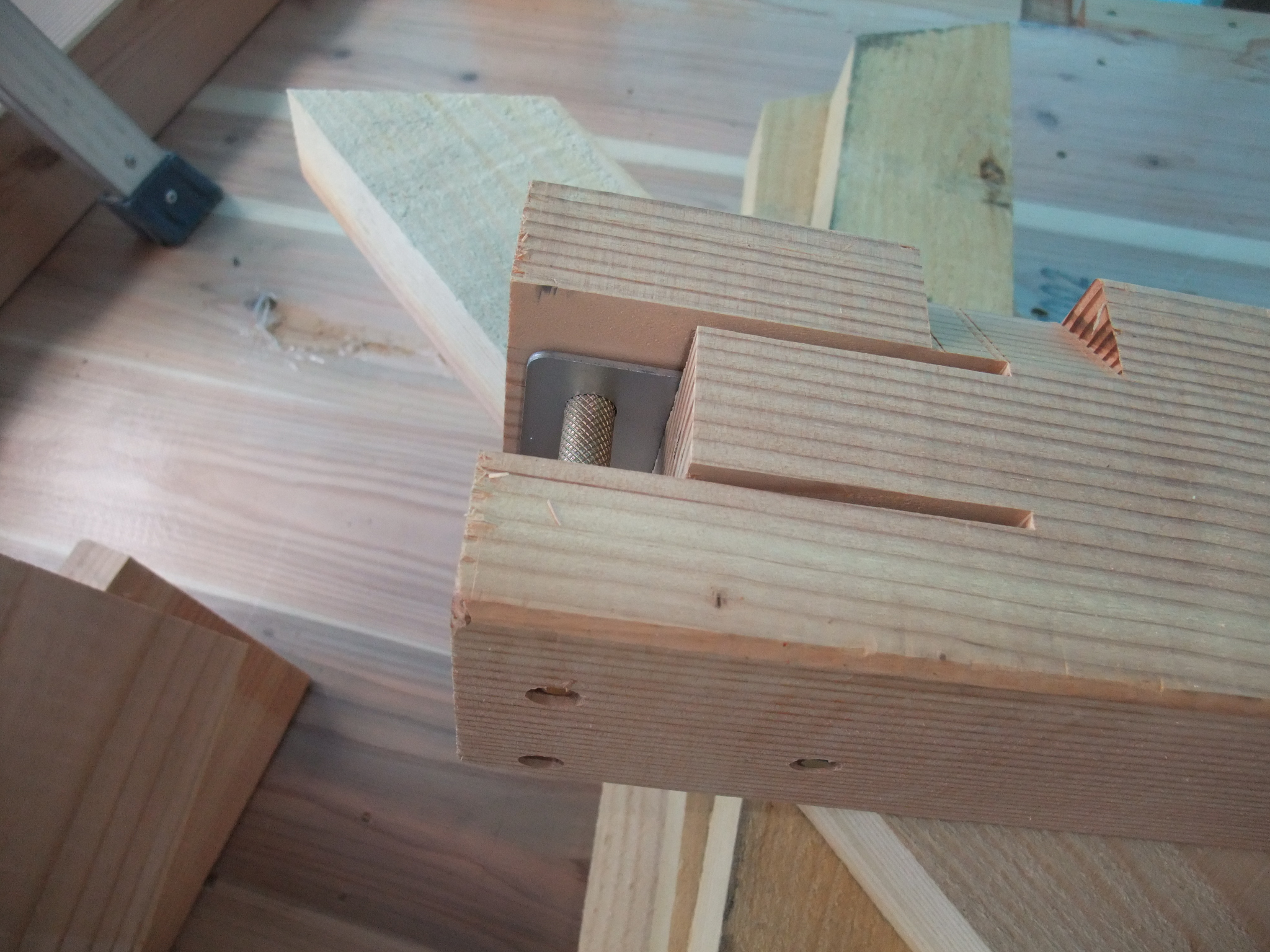 ドリフトピン工法。梁に埋め込まれた凹側の金具